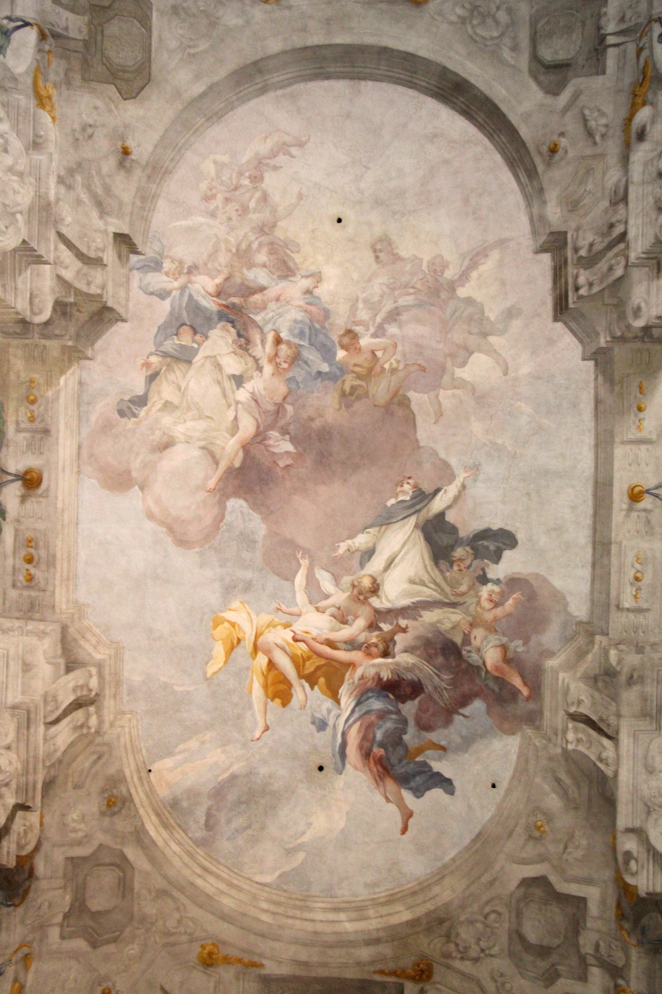 San Domenico (Fiesole)